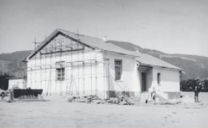 Costruzione Site Rigel